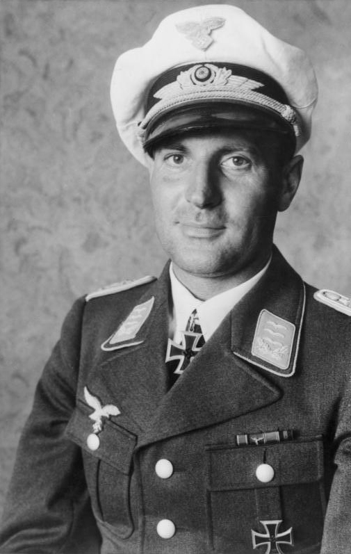 Scherl Bilderdienst / Weltbild Hauptmann [Walter] Gericke, Inhaber des Ritterkreuzes zum Eisernen Kreuz. 16.7.1941 [Herausgabedatum] 6909-41